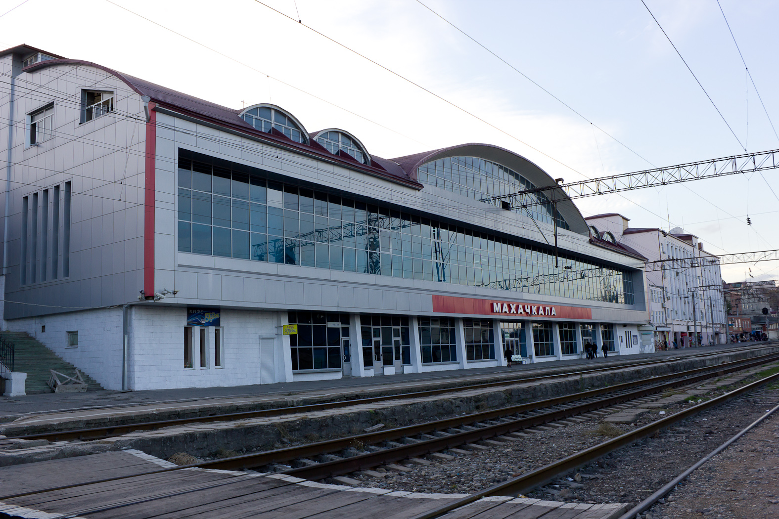 Вокзал Махачкалы